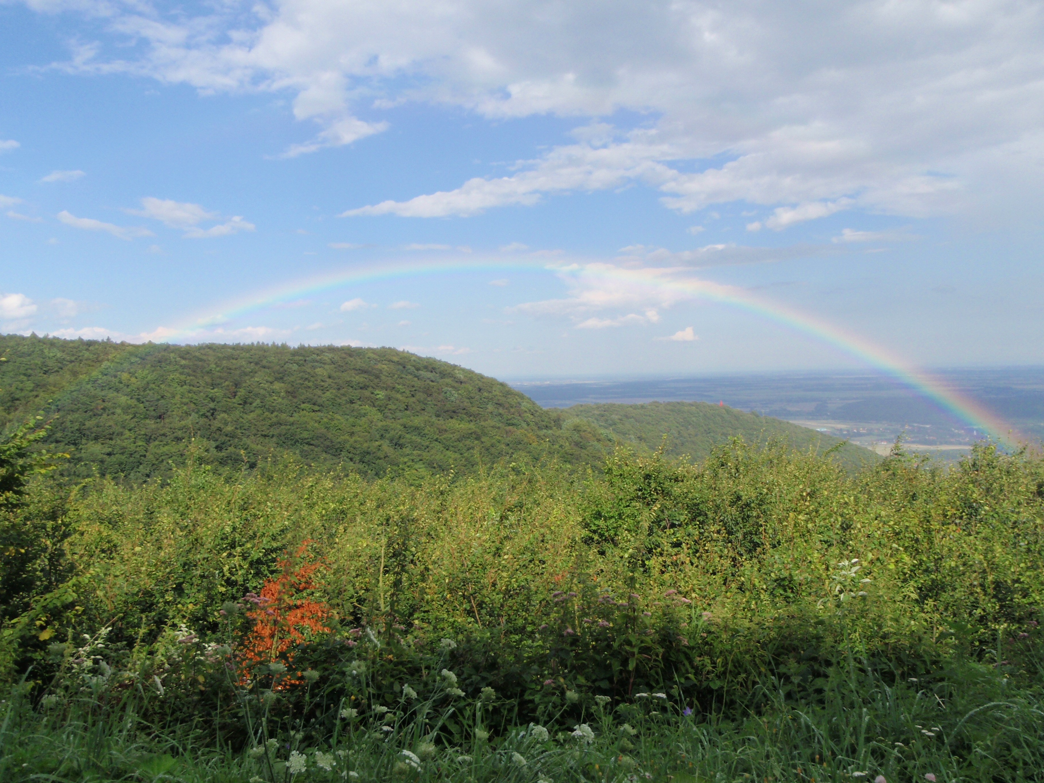 Günser Gebirge, hinter ist St. Vid Kapelle und Günsecktal